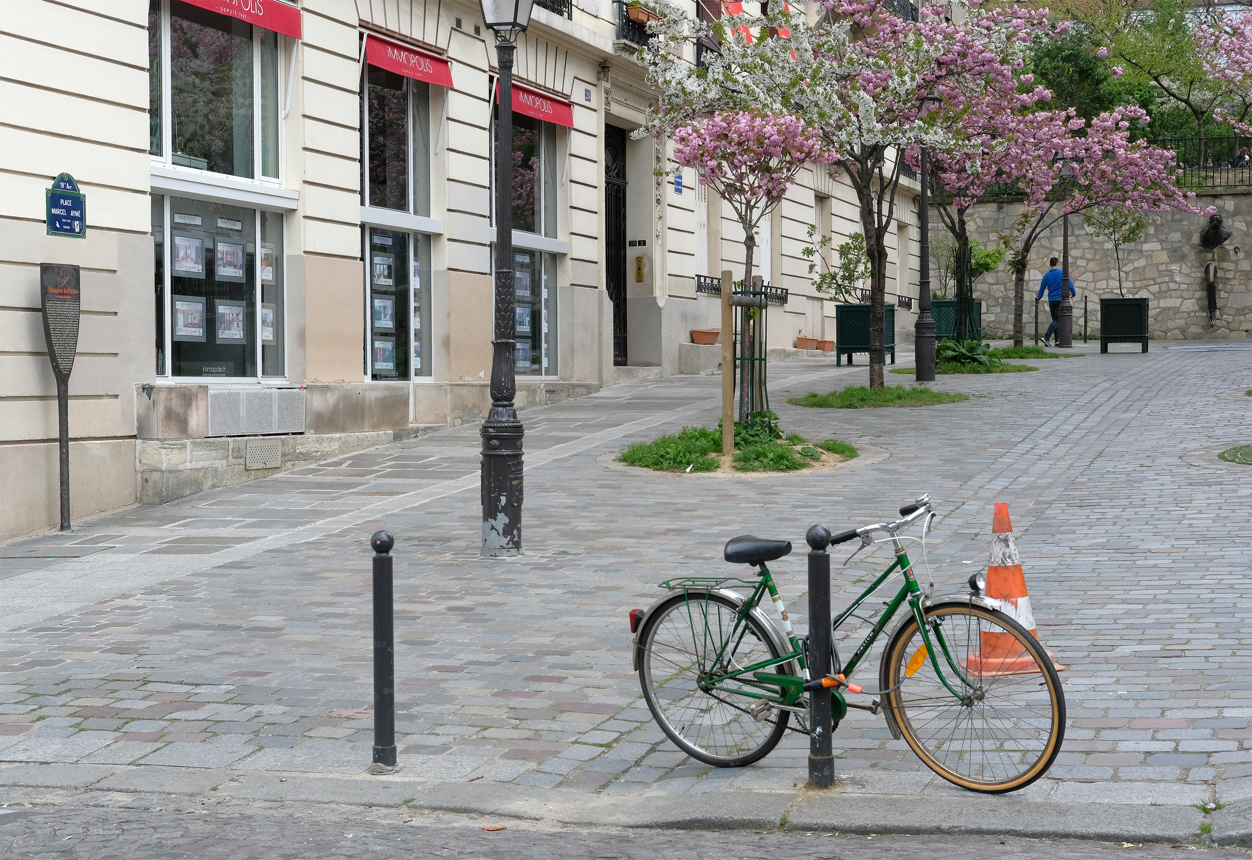 Place Marcel-Aymé avec, à gauche, un panneau historique de la ville de Paris et, à droite, une sculpture de Jean Marais représentant le "Passe Muraille". - Paris XVIII